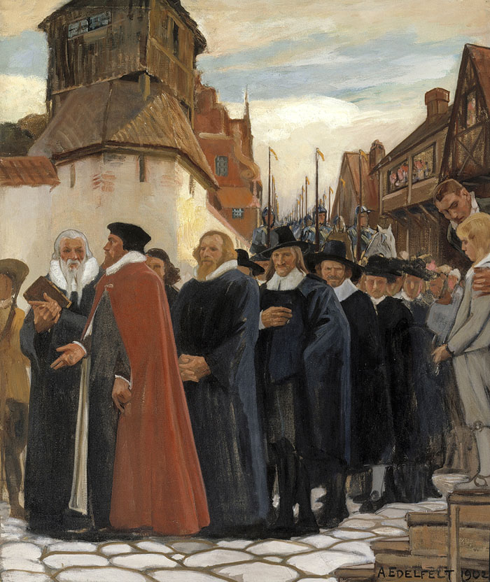 Albert Edelfelts painting Turun akatemian vihkiäiset (part 3/3).